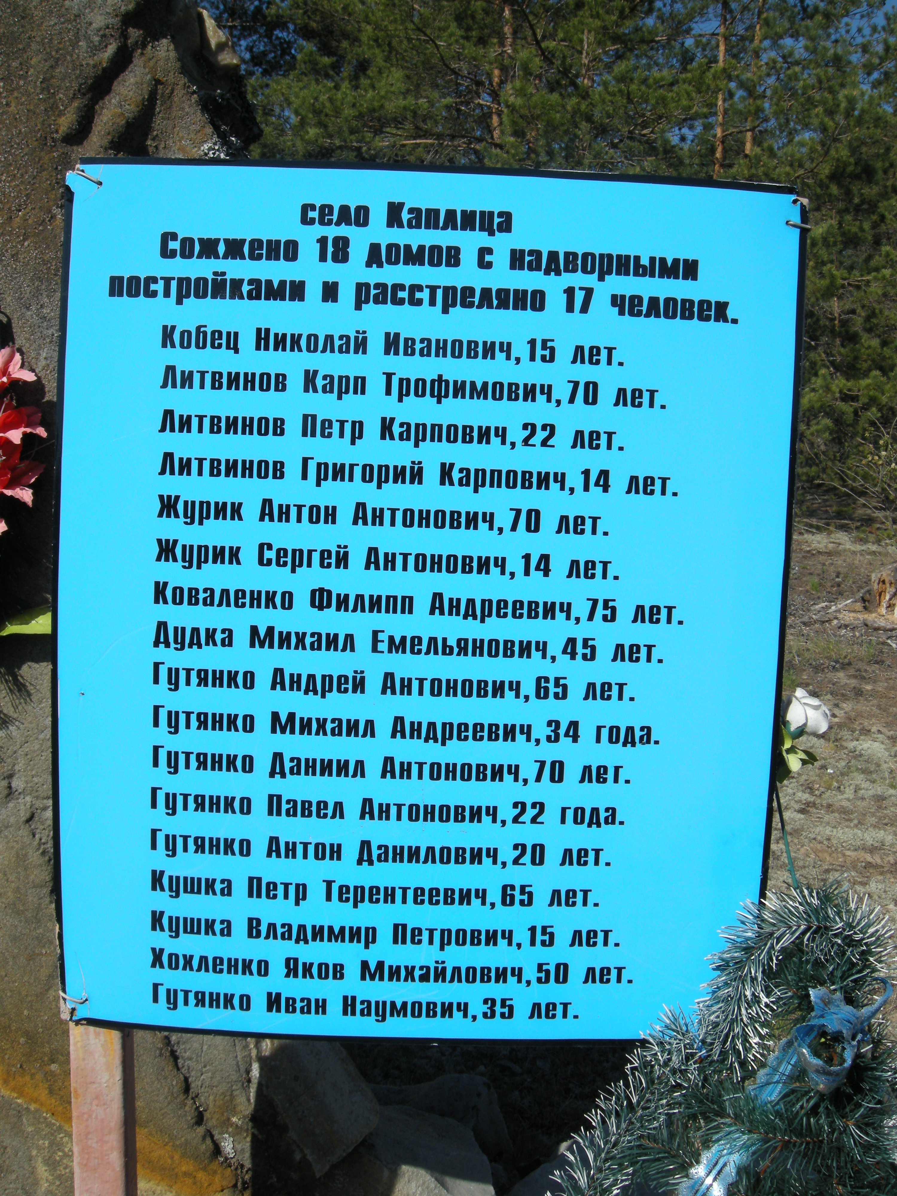 пам'ятний знак загиблим мешканцям хутора Каплиця